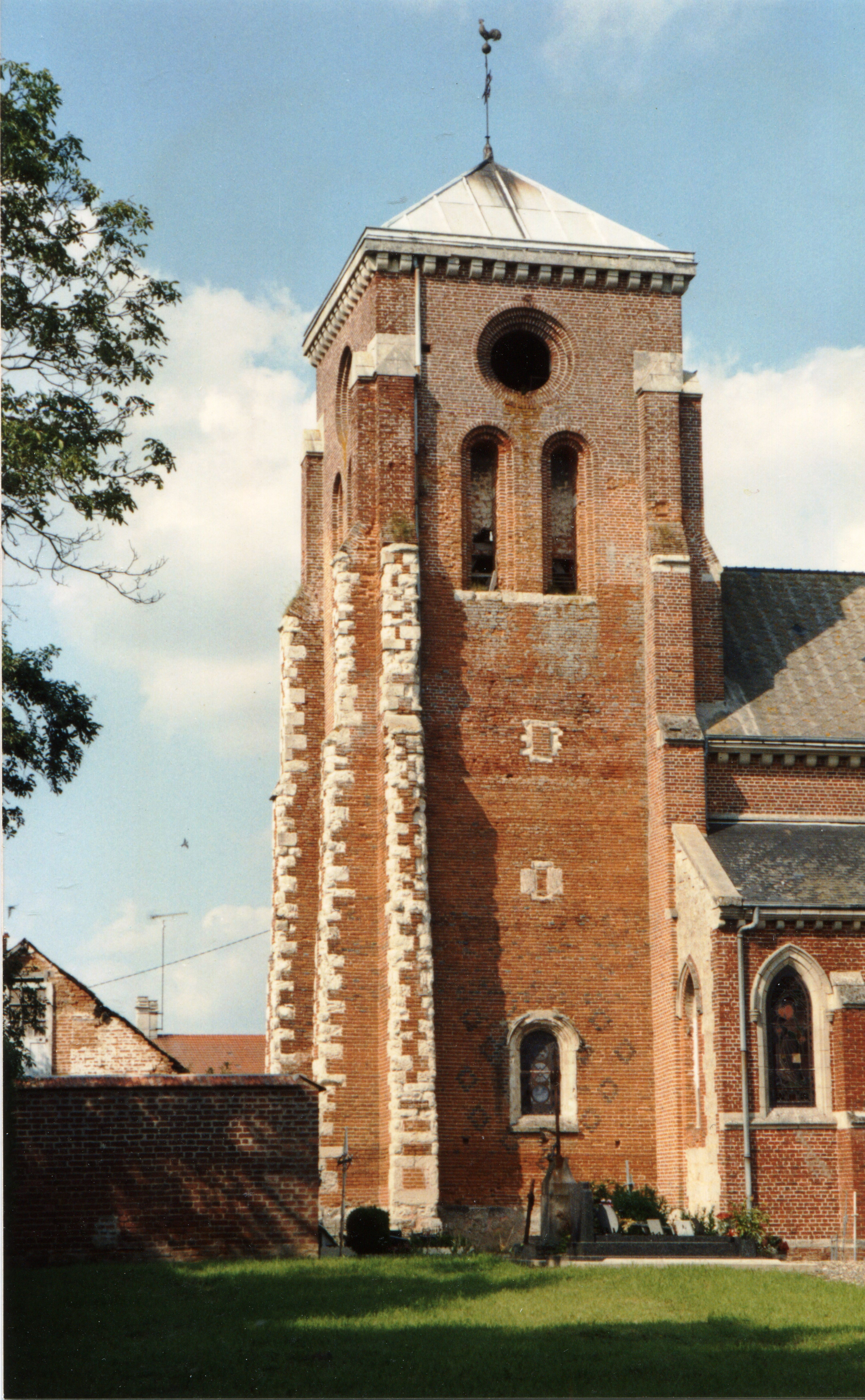 La preĝejo de sankta Marteno en Cilly, Francio.